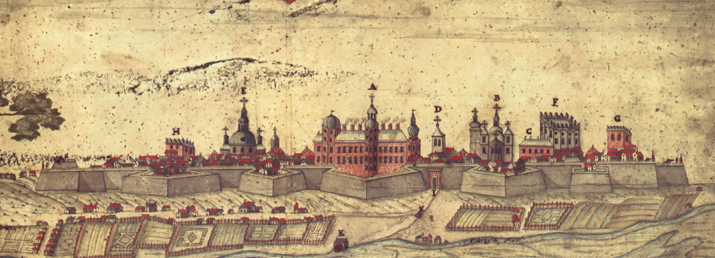 Беларуская (тарашкевіца): Панарама Быхава (Старога Быхава)